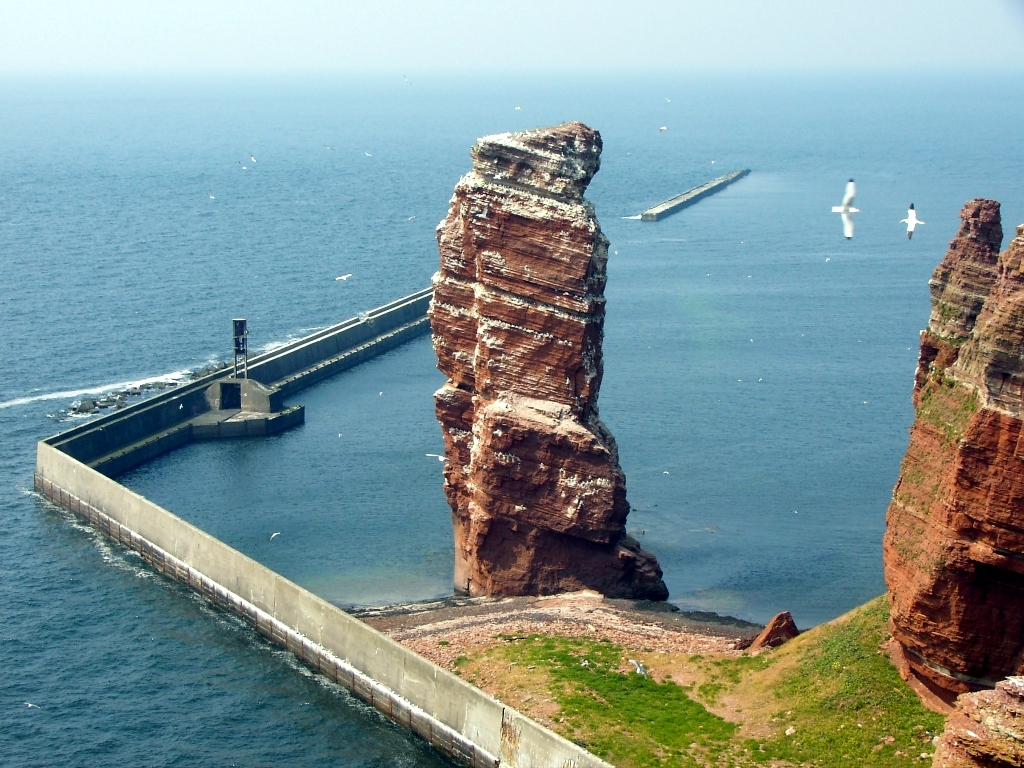 „Lange Anna“, Wahrzeichen der Insel Helgoland